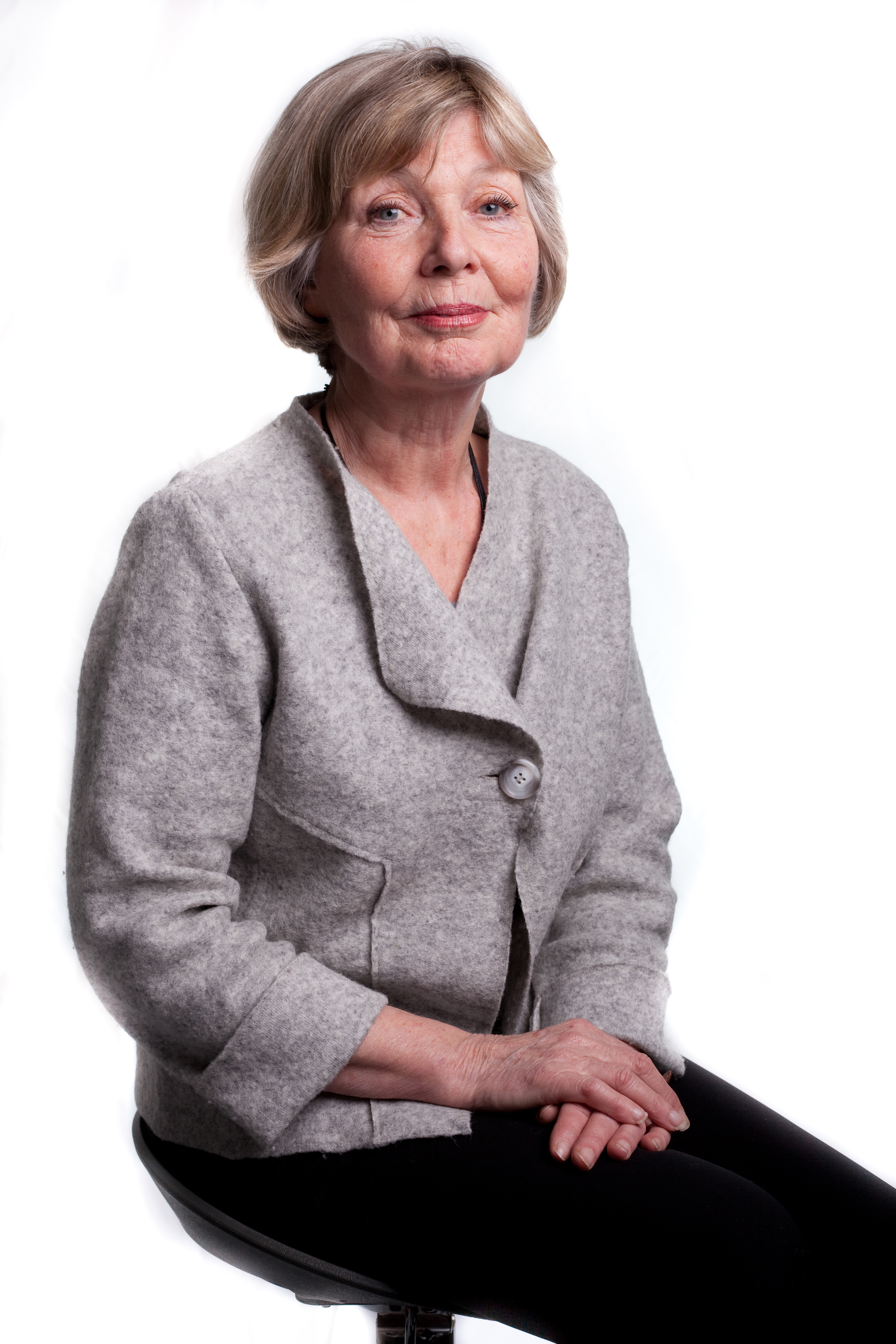 Foto: Ole Morten Melg�rd H�yoppl�selig versjon